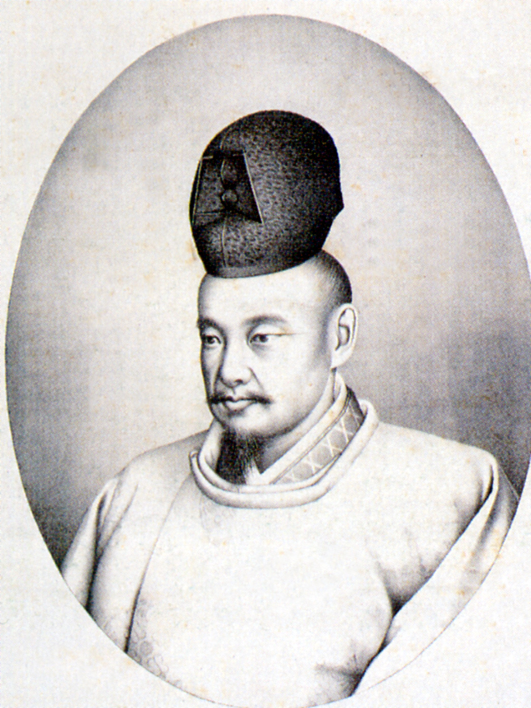 徳川斉昭 Portrait of Tokugawa Nariaki.